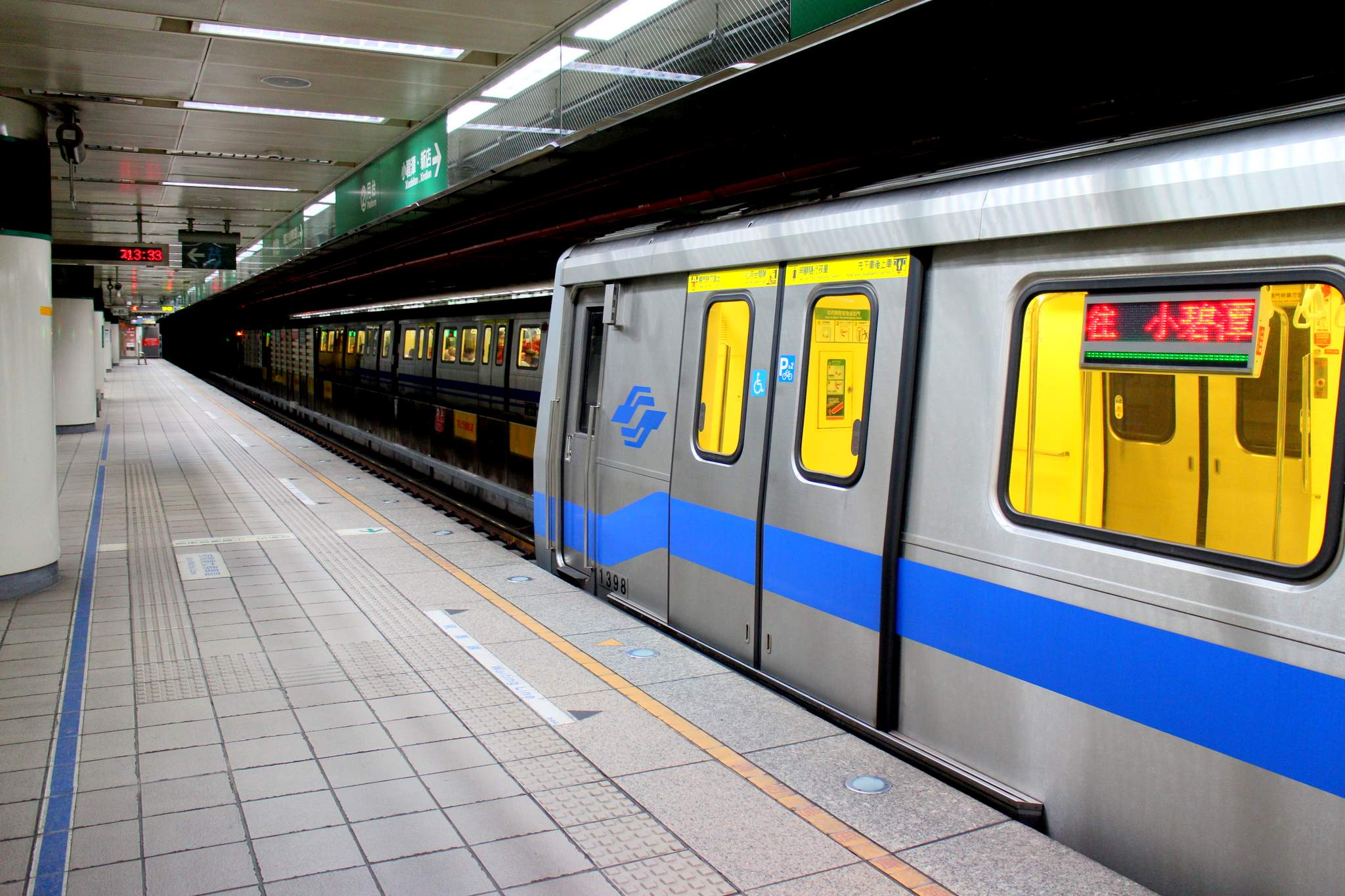 台北捷運七張站第二月台，往小碧潭站列車1398車廂。